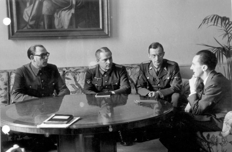 Zentralbild II. Weltkrieg 1939-45 Reichsminister Dr. Josef Goebbels empfängt am 28.2.1945 in Berlin den Kollaborateur General Wlassow und seinen Chef des Propagandastabes Generalleutnant Schilenkow zu einer Besprechung. [2.v.r. SS-Oberführer Kroeger]